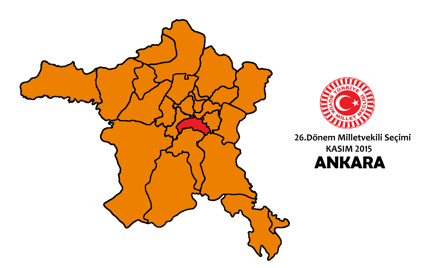 2015 genel seçim sonuçları